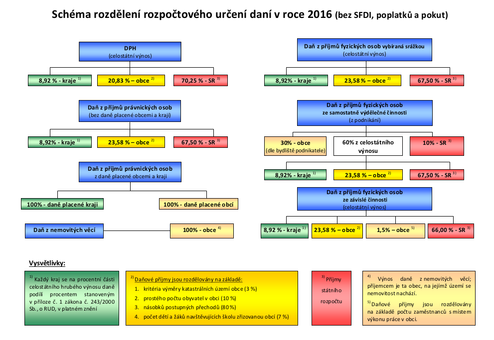 Nové schéma RUD platné od 1.1.2016